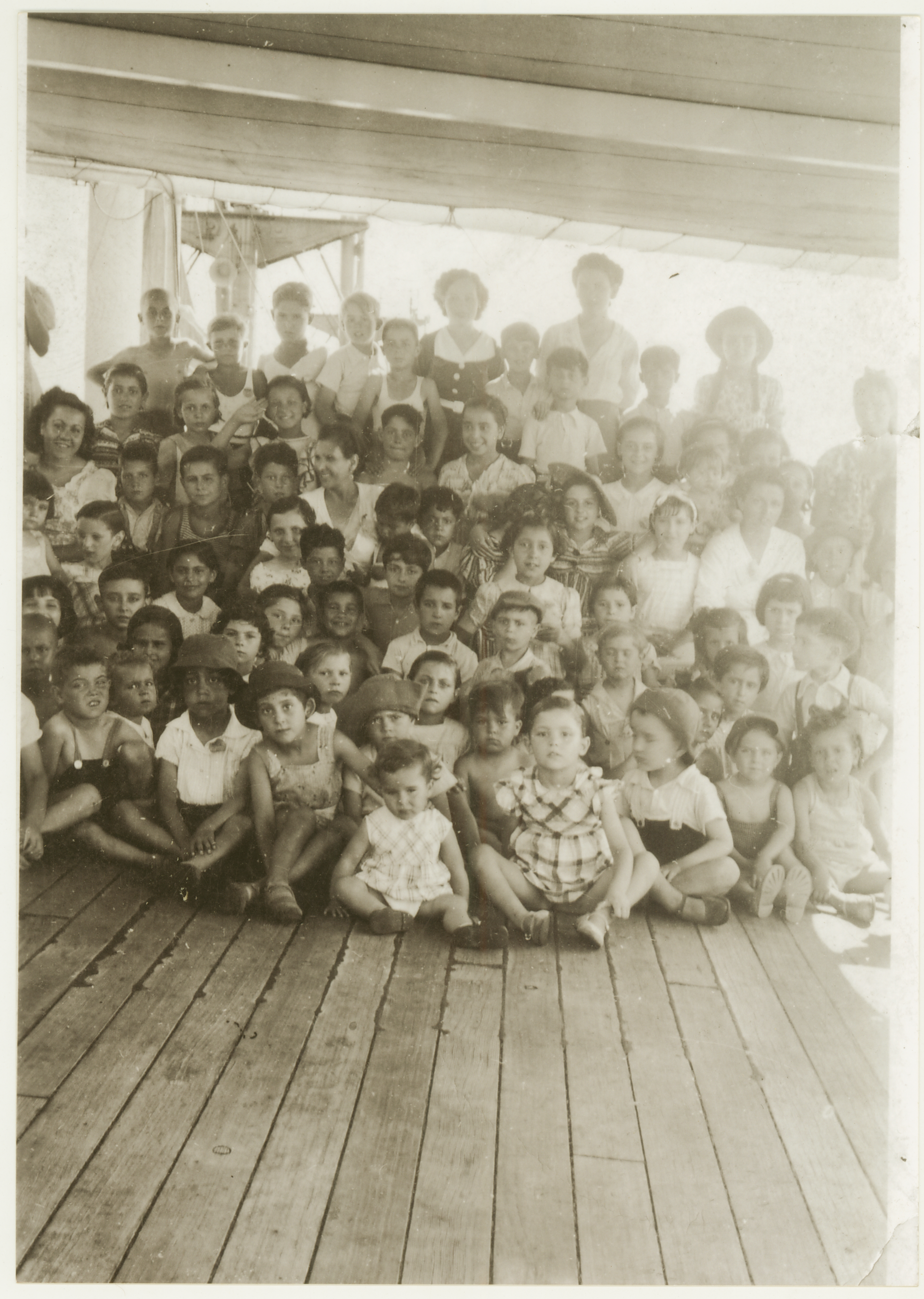 Un grupo de niños embarcados en el Winnipeg.